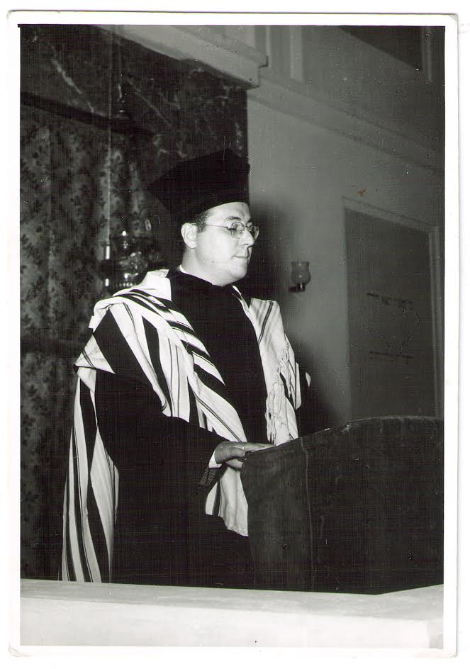 בולוניה 1955 - בבית הכנסת של העיר בולוניה, כששוקם לאחר הרס המלחמה